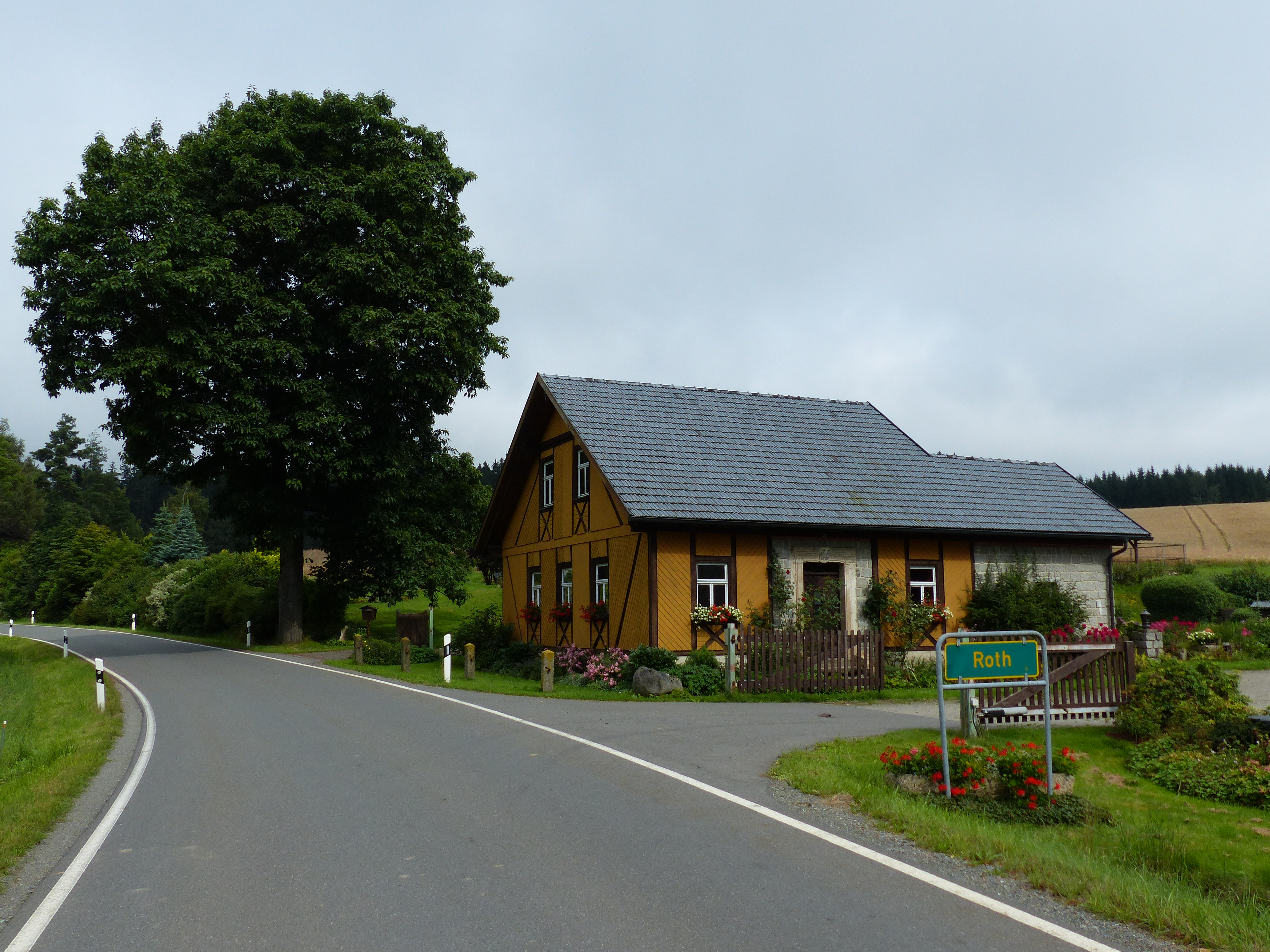 Ortsteil Roth bei Marktleugast